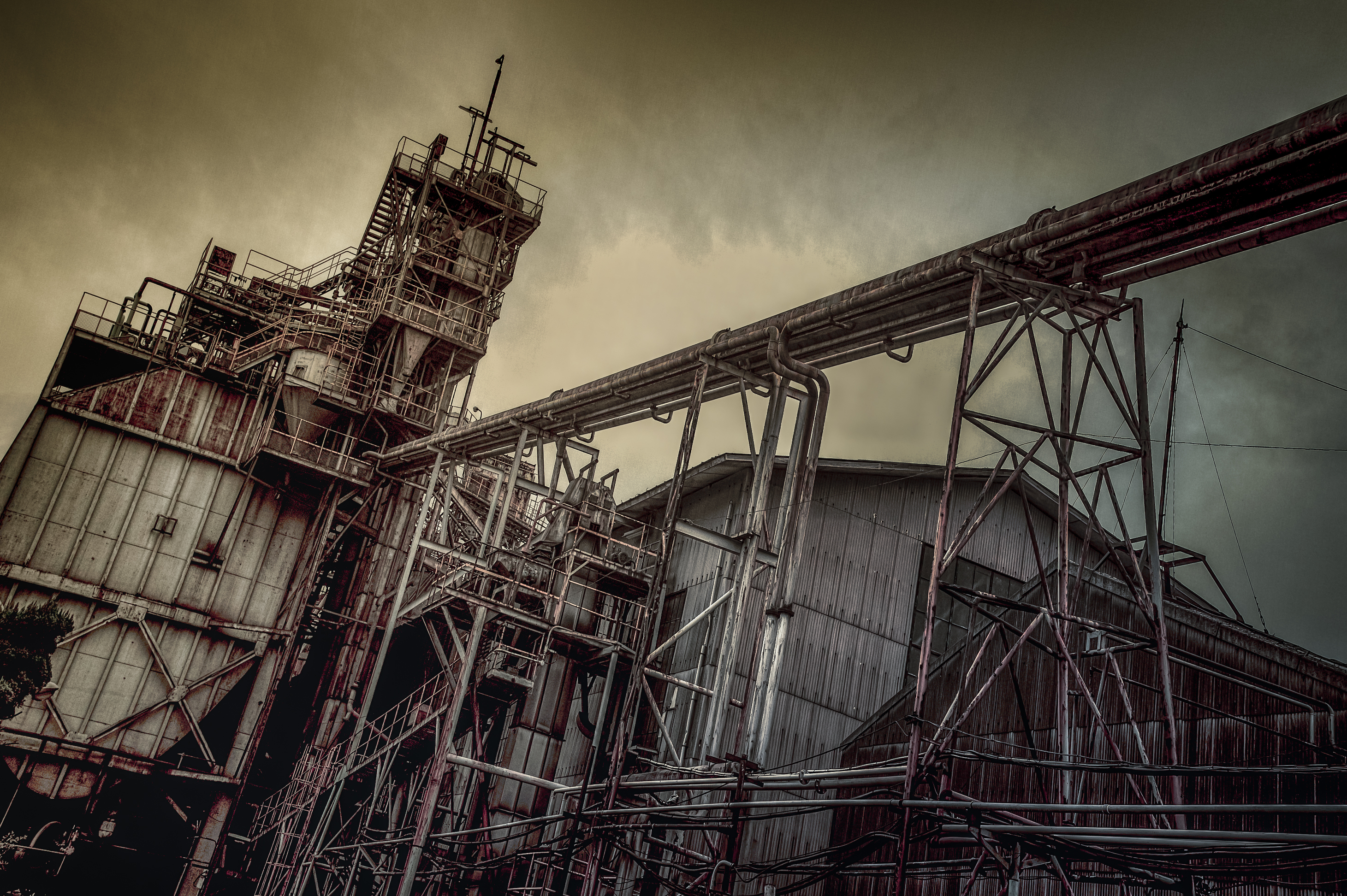 昭和電工横浜事業所